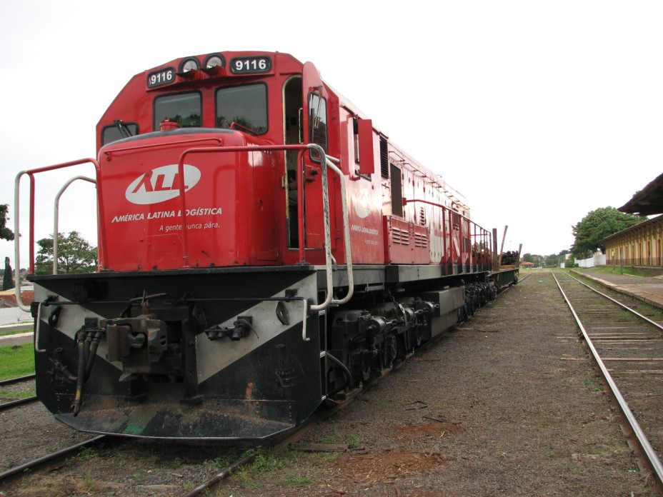 ALL 9116 vista de frente, GE U26C Pompéia-SP-Brasil